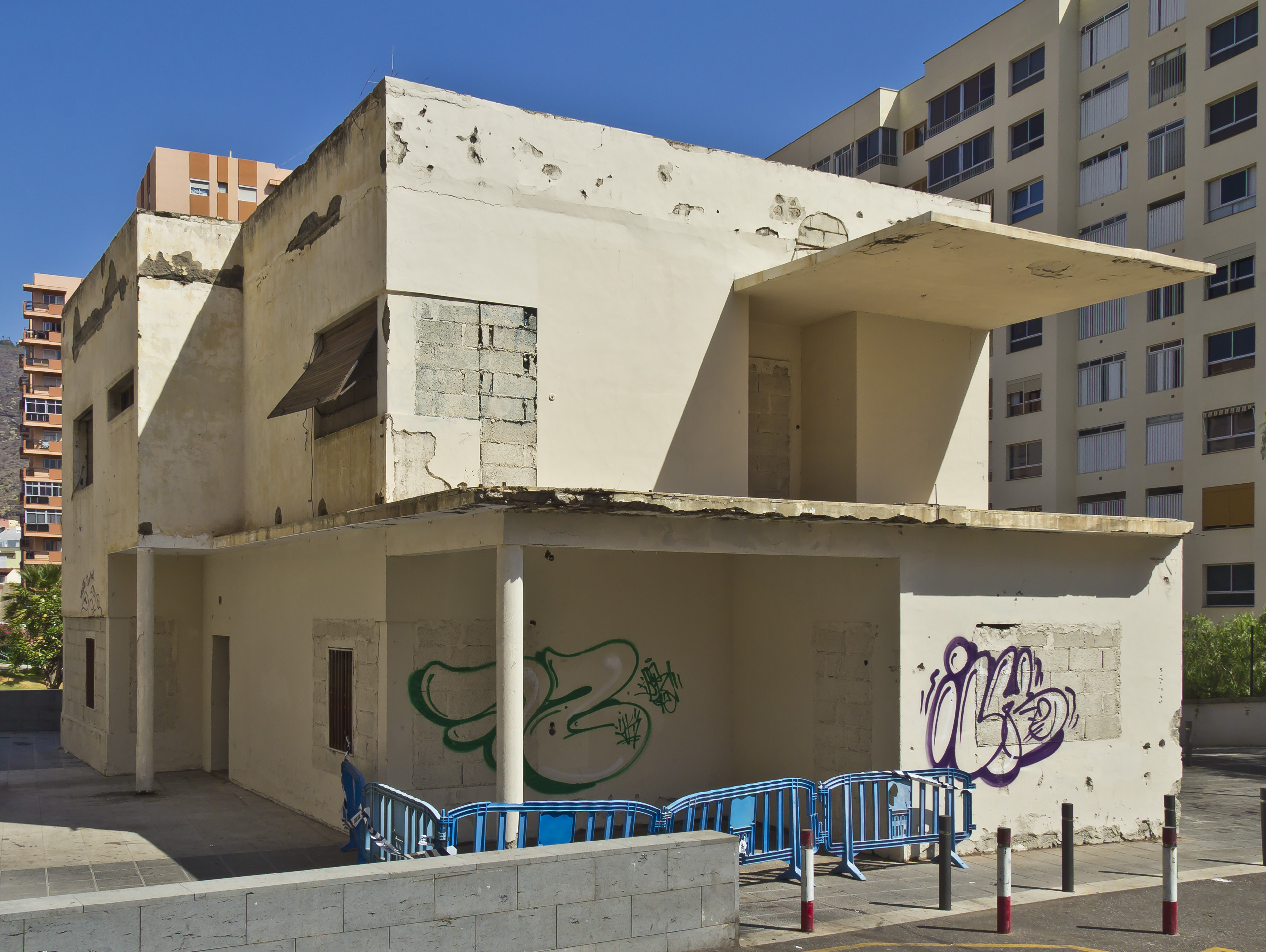 Die Casa Mascareño wurde 1935 von dem Architekten José Blasco Robles entworfen. Das Gebäude steht auf der Plaza Mascareño in Santa Cruz de Tenerife.